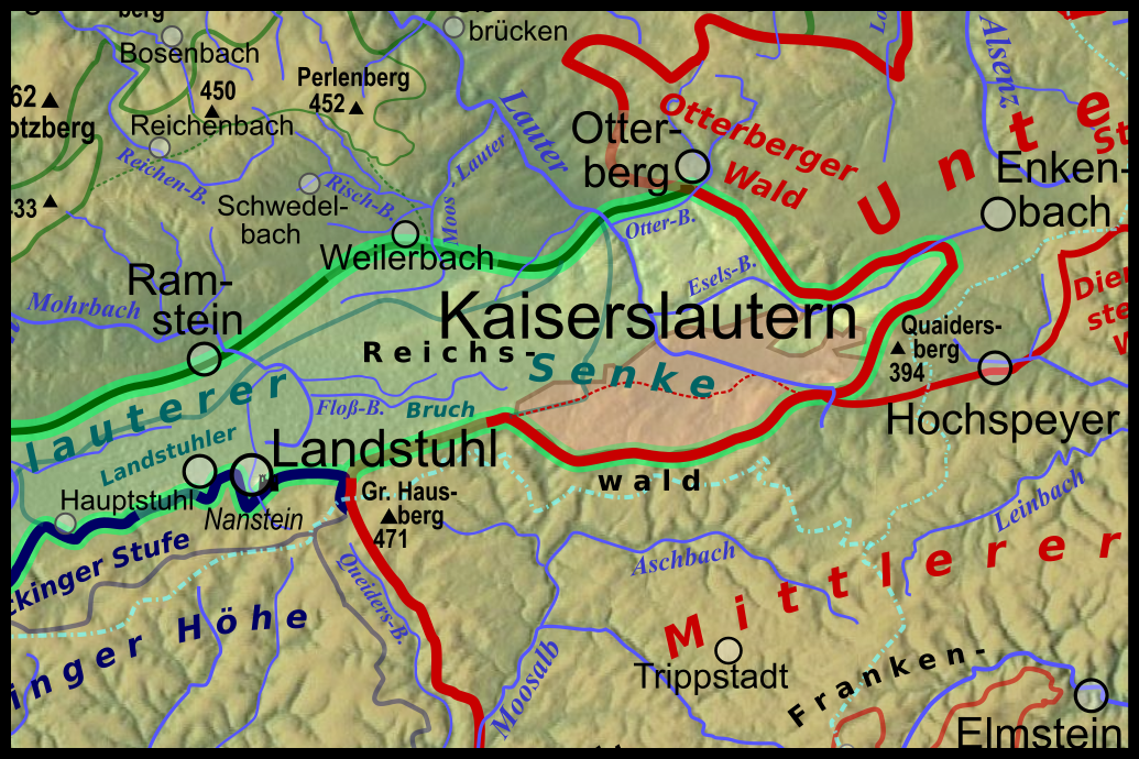 Naturräumliche Karte des Ostteils der St. Ingbert-Kaiserslauterer Senke